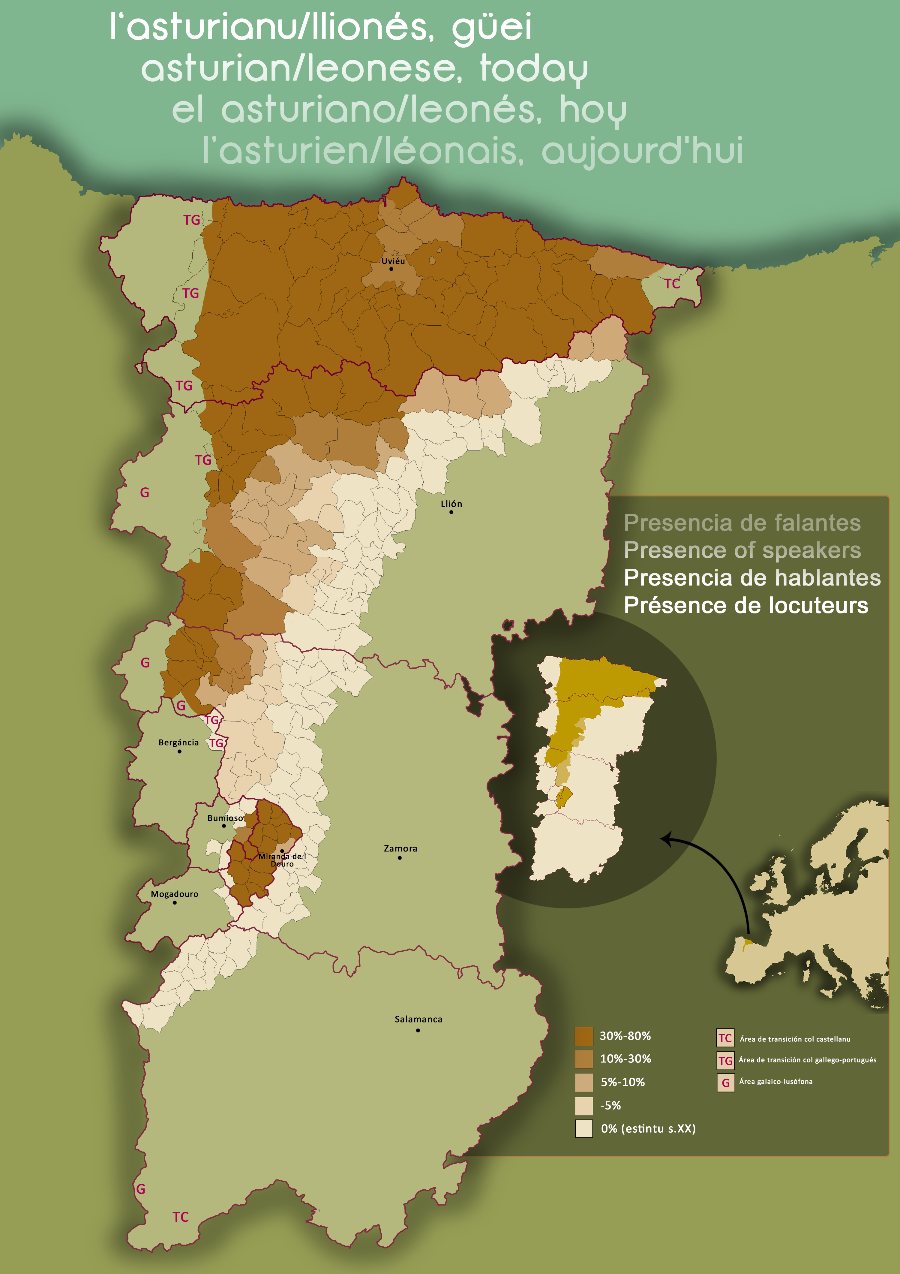 Usu y estensión de la llingua asturiana